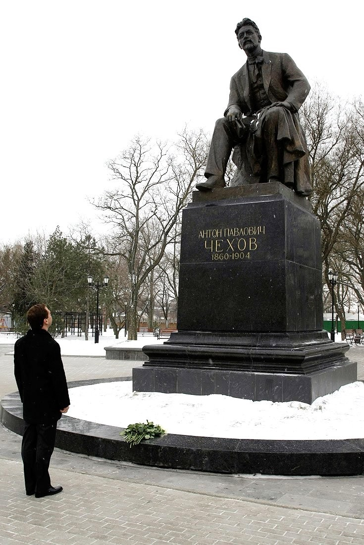 Празднование 150-летия со дня рождения Чехова